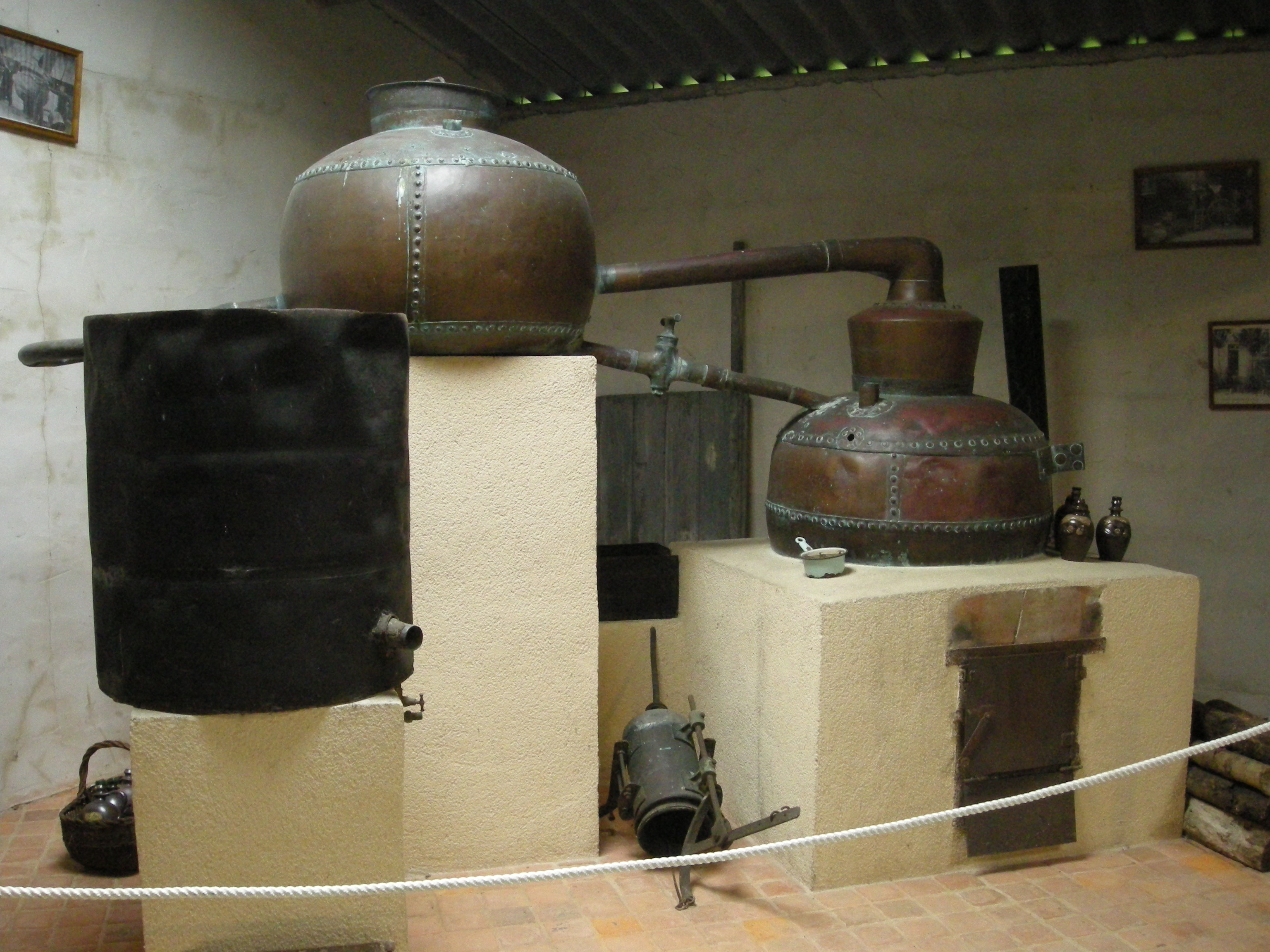 Alambic à repasse pour la distillation du Calvados (Saint-Jean-des-Champs, Normandie)